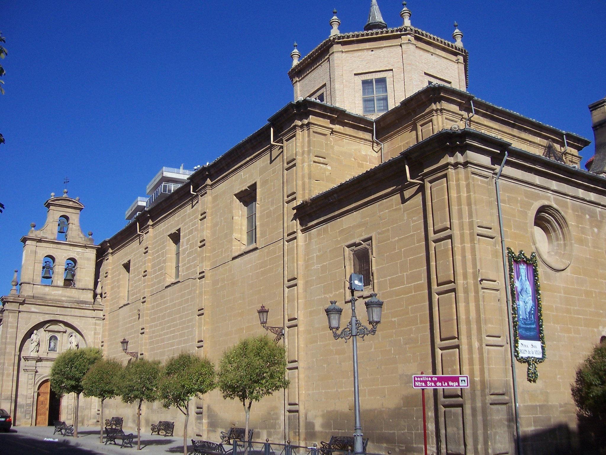 Basílica de Nuestra Señora de la Vega de Haro - La Rioja